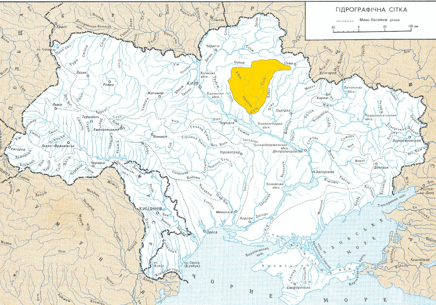 Бассейн реки Сула.